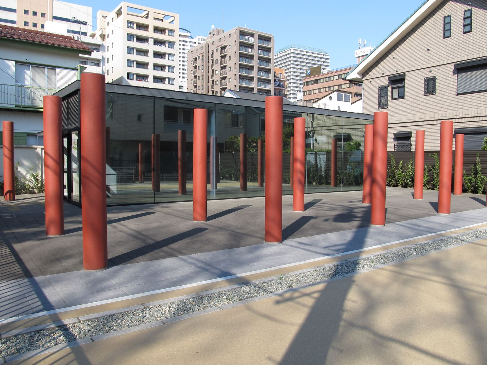 国史跡武蔵国府跡史跡整備地（国衙跡）